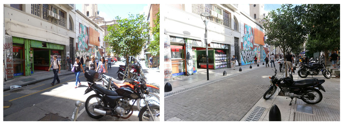 Suipacha al 100 (esq. Mitre), calle del Microcentro de Buenos Aires renovada en el 2014.